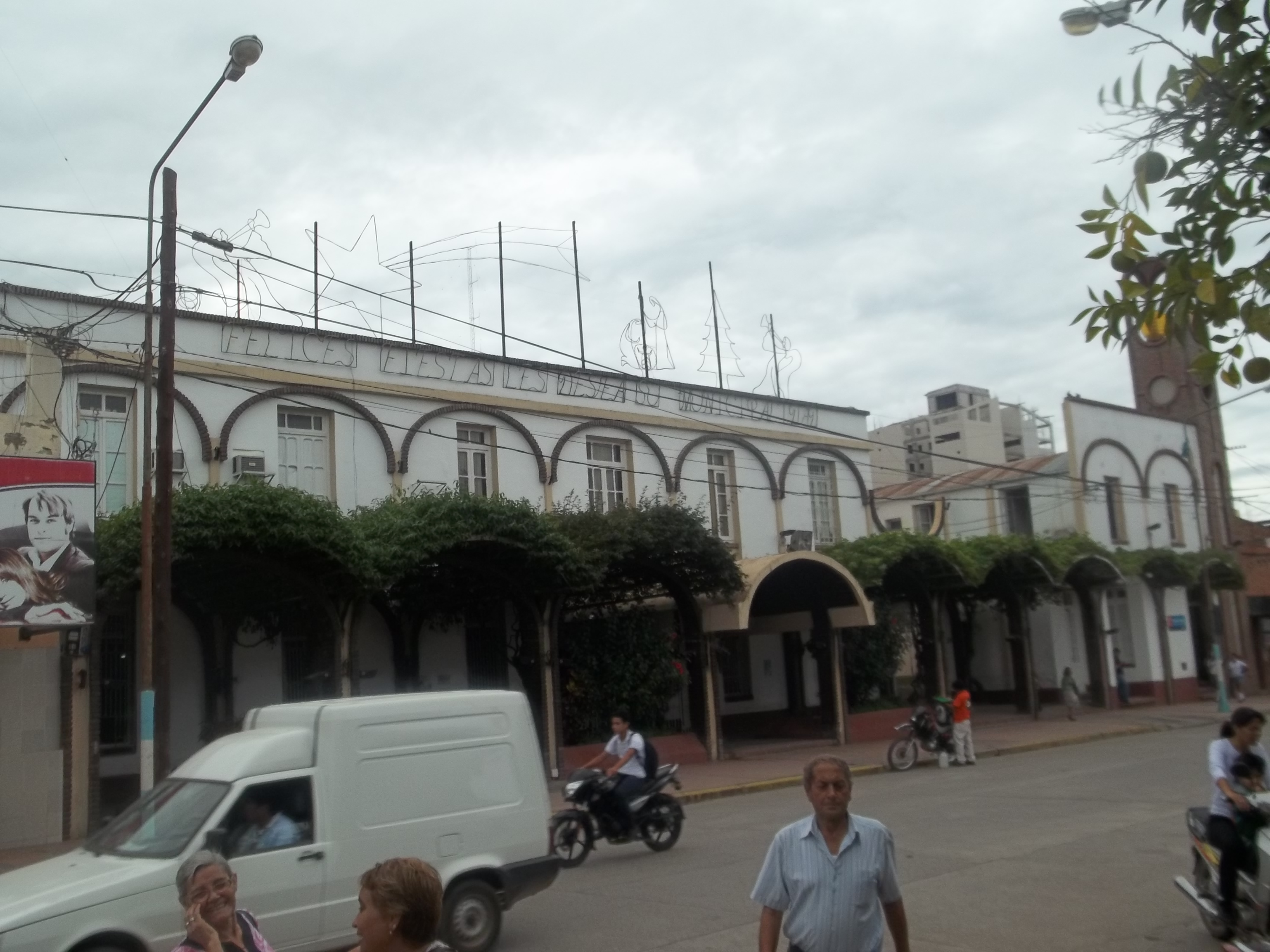 Hall town of Libertador General San Martín, Jujuy, Argentina.